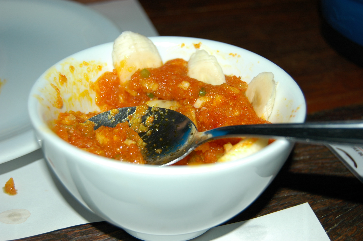 Restaurante Sobaria, culinaria sul matogrossense